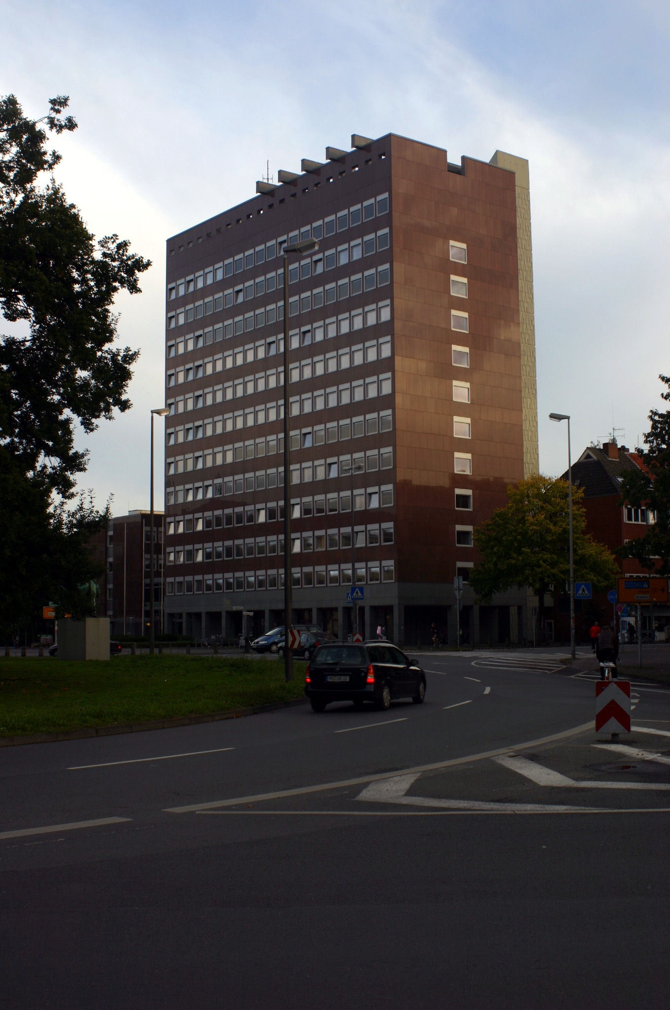 Münster, Germany, Stadthaus 2 am Ludgeriplatz, ehemals Kreishaus des Landkreises Münster